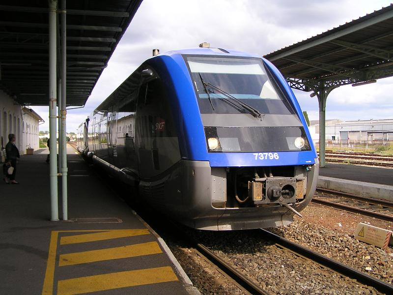 train TER Poitou-Charentes